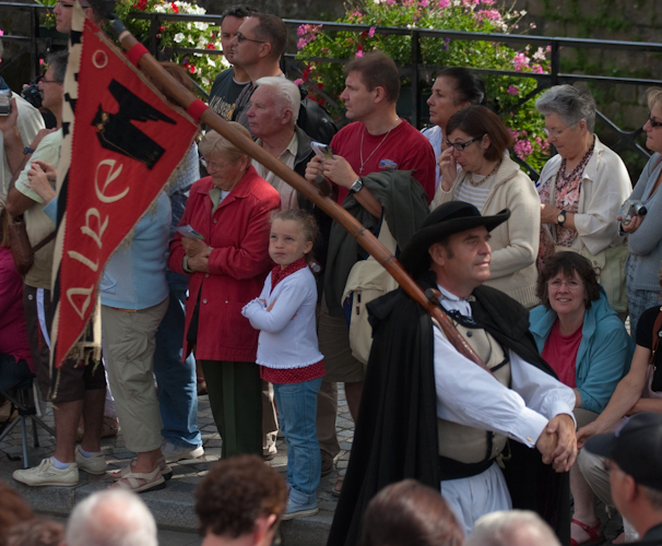 Porte-drapeau de la Kevrenn Alré, bagad d'Auray, avec les couleurs rouge et noir emblématiques de la Kevrenn, au festival de Cornouaille 2009. Le drapeau représente une chouette, attaché à une faux, symboles de la chouannerie.